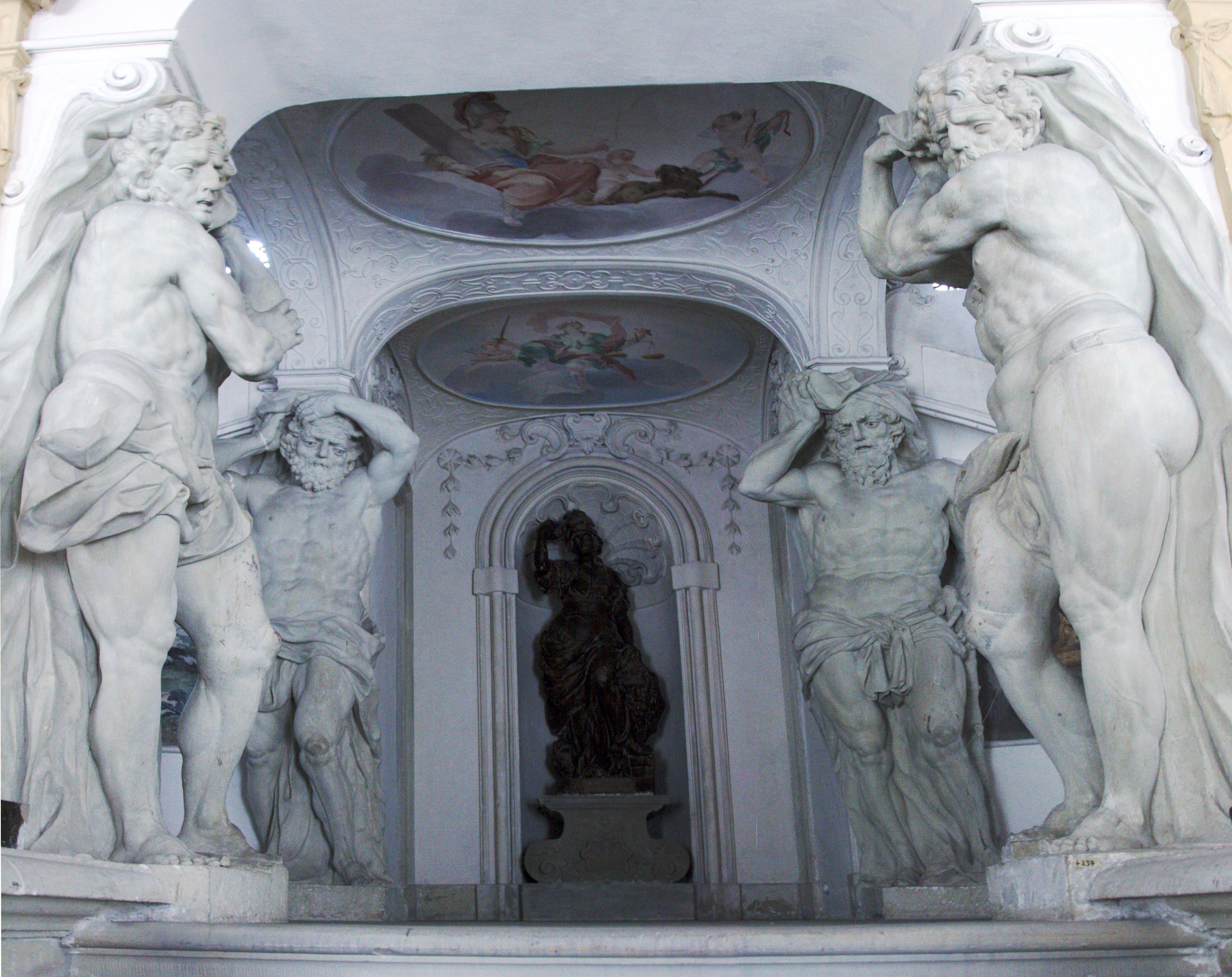 Treppenhausaufgang des Riesenbaus im Residenzschloss Ludwigsburg. Die vier Riesen stützen das Treppenhaus. Erbaut um das Jahr 1720